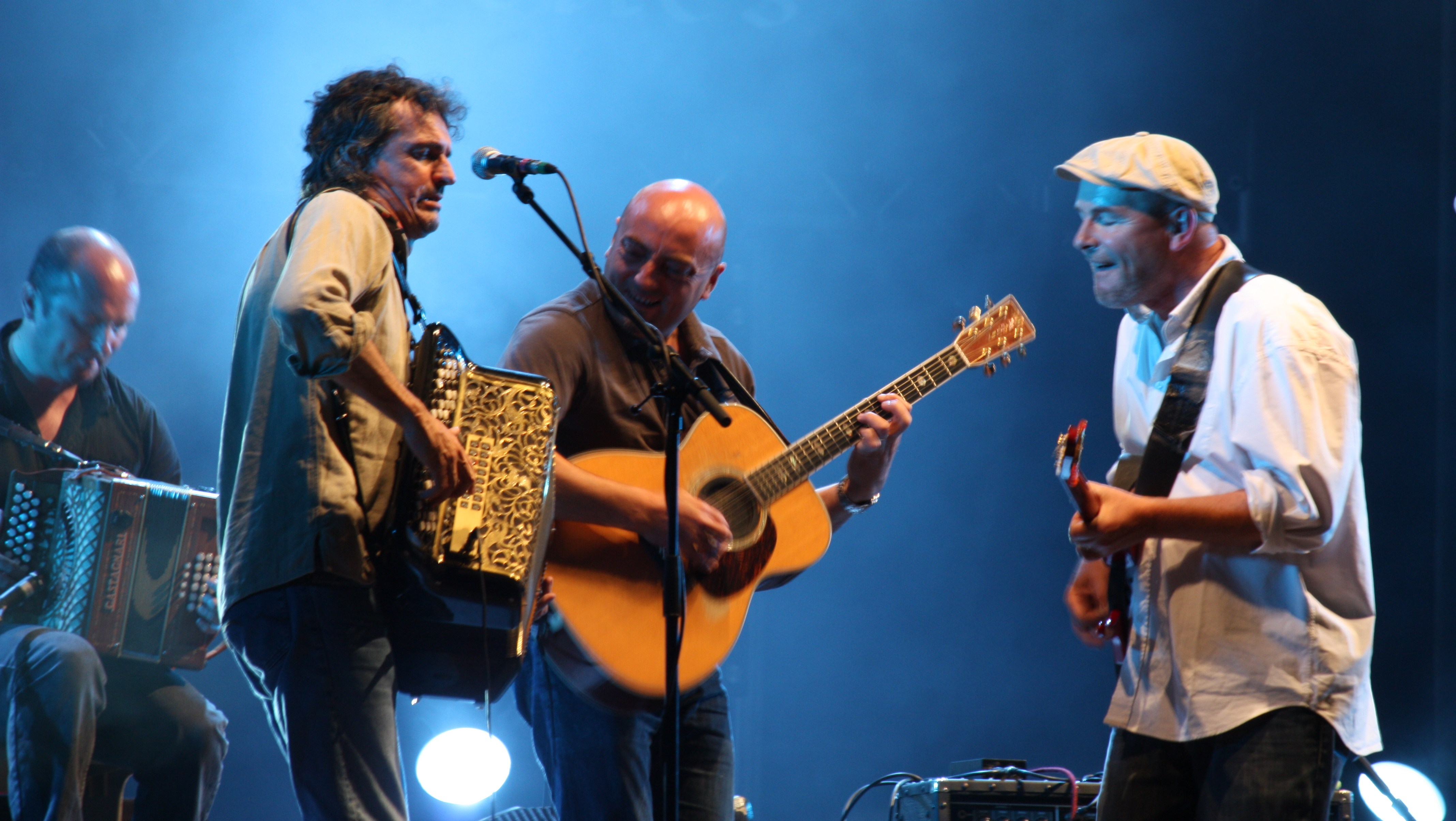 Red Cardell et leurs invités, les frères Guichen